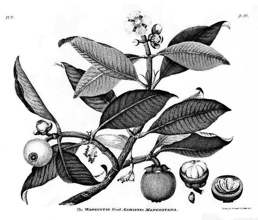 Mangustin